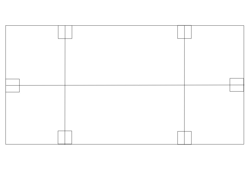 Aspecto de la mesa para el juego del cuadro 71/2